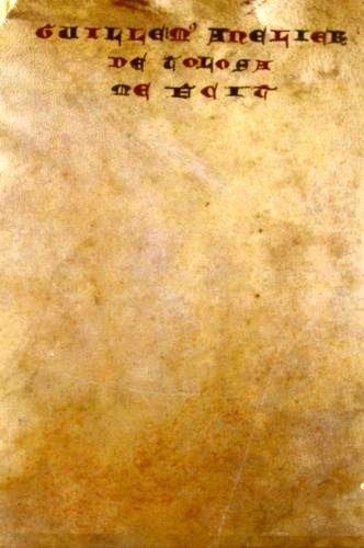 La guerra de Navarra - facsimil del primer folio del manuscrito